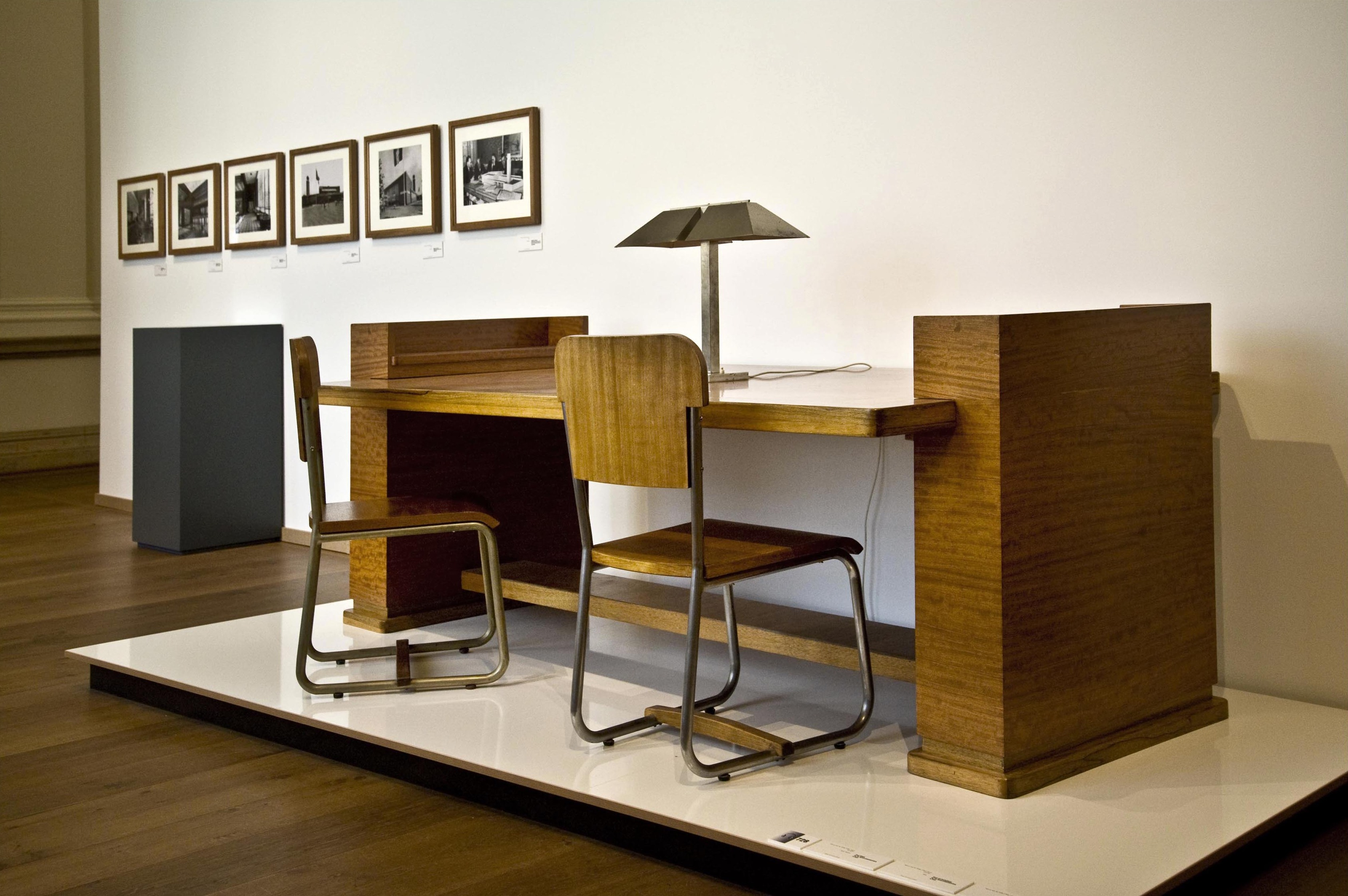 Tentoonstelling (maart - juni 2013) Neues Museum Weimar: Leidenschaft, Funktion und Schönheit. Henry van de Velde und sein Beitrag zur europäischen Moderne. Op de foto: meubels door Van de Velde ontworpen voor de Gentse Boekentoren - 1939